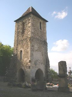 vieux clocher de Florimont (Territoire de Belfort). Photo prise en mai 2004 par LP90 Licence GFDL